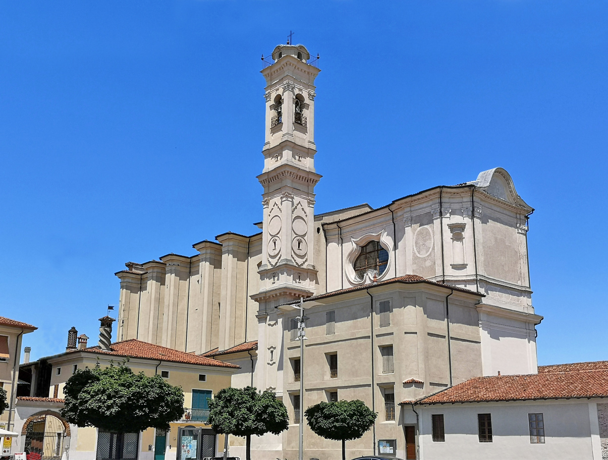 Chiesa parrocchiale di Travagliato